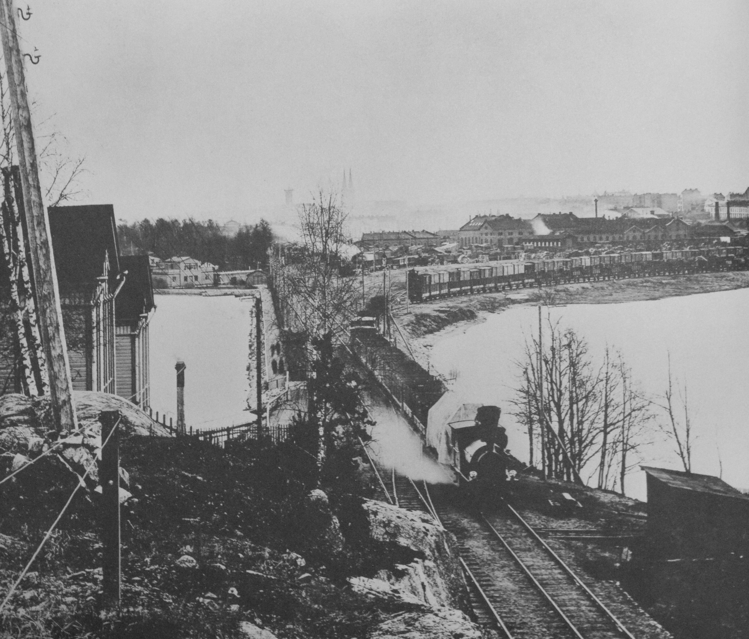 1890-luvulla Eläintarhanlahden ja Töölönlahden erotti kannas, jota pitkin oli vedetty kaksi rautatiekiskoa. Valtio oli rakentanut Helsingin kaupungin vaatimuksesta kävelytien raiteiden viereen.